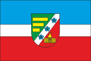 Прапор Брусилівського району